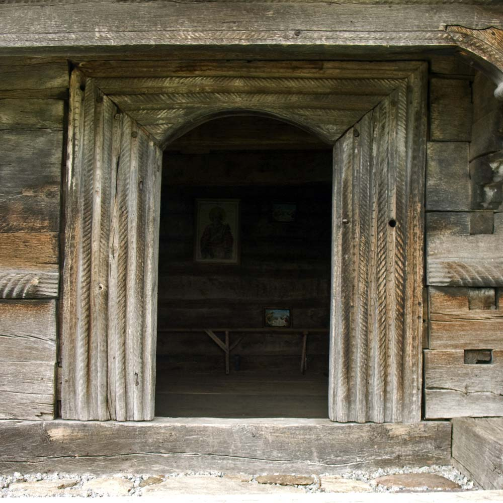 Biserica de lemn din Tusa, portalul de intrare.